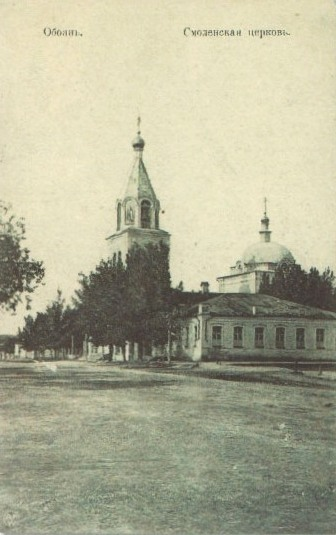 Дореволюционная открытка с изображением Храма Смоленской иконы Божией Матери в городе Обоянь